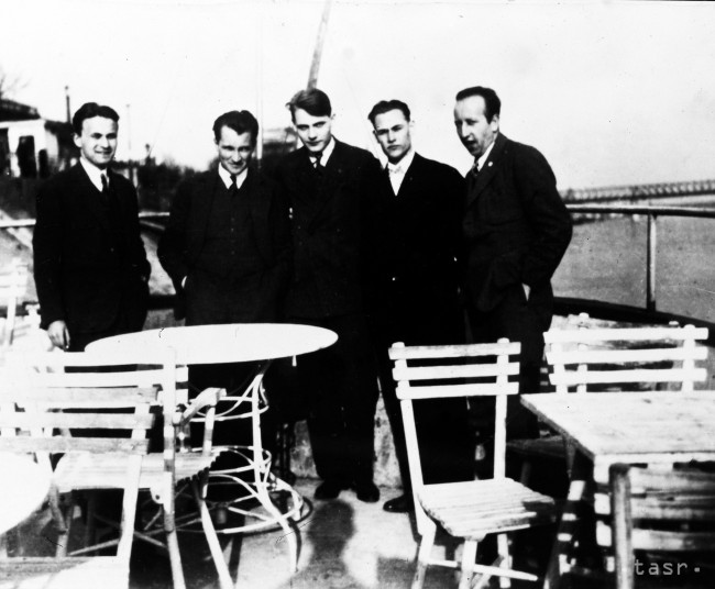 Archívna snímka davisti bratislavská skupina slovenský komunistický politik spisovateľ novinár diplomat Vladimír Vlado Clementis básnik Laco Novomeský Jozef Rybák Daniel Okáli Karol Svetlík ml. bratislavská ľavicová revue DAV osobnosti retro 20 -te roky.